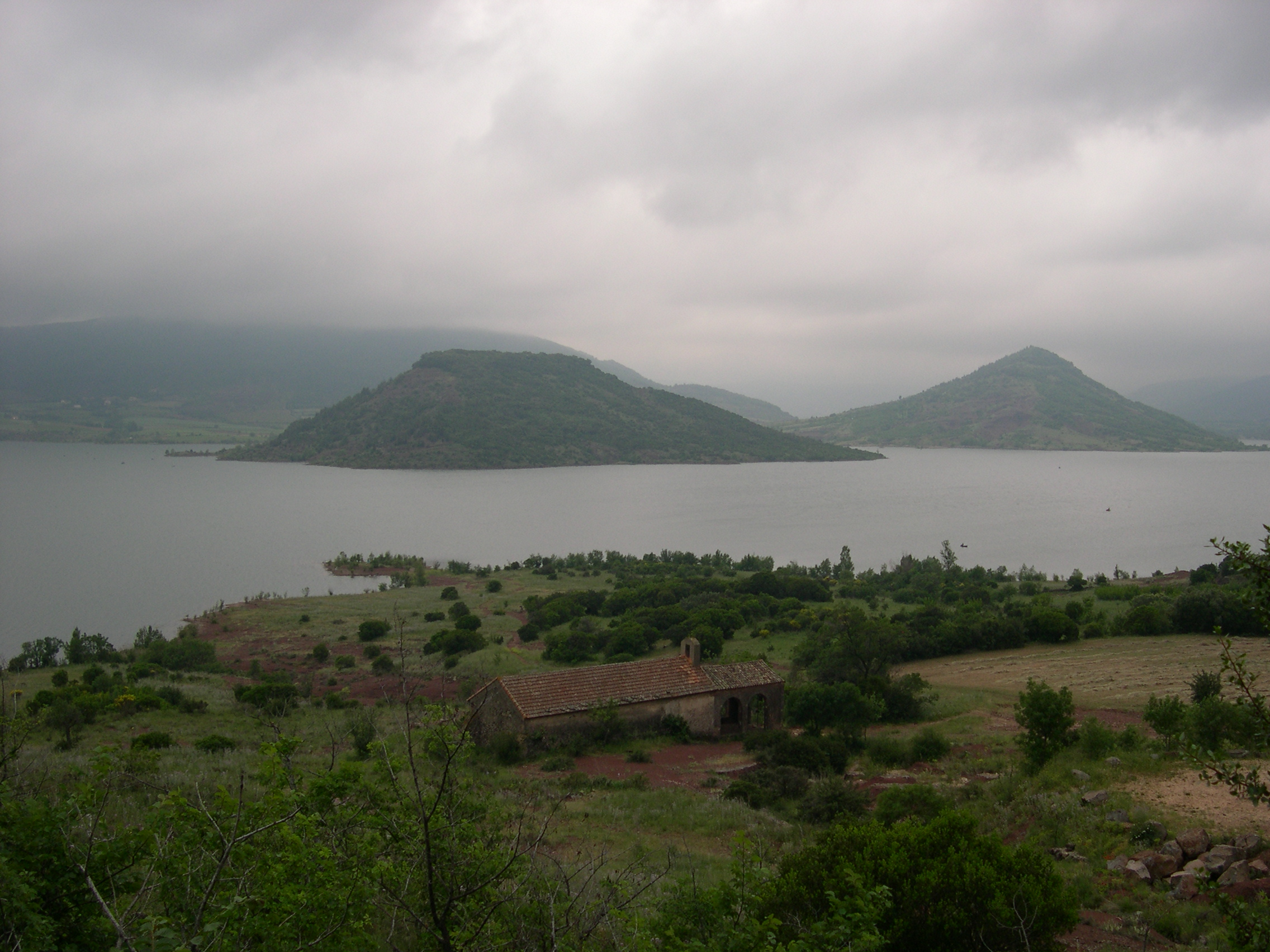 Celles (Hérault) - chapelle Notre-Dame-des-Clans (XIV-XVe siècles) et lac du Salagou.